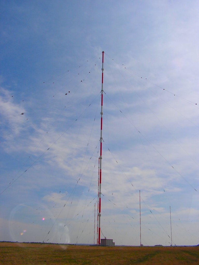 Ein Mast des Marinesenders DHO38 – Längstwellensender der Marine der Bundeswehr, in der Nähe von Saterland-Ramsloh im Landkreis Cloppenburg (Niedersachsen)